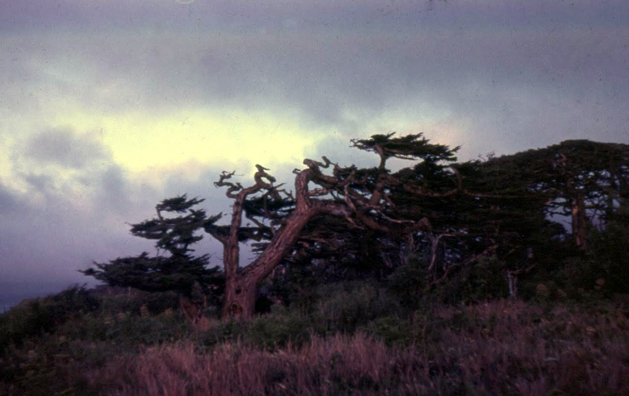 Остров Итуруп. Деревья принявшие форму буквы «Г» из-за постоянного направления ветра